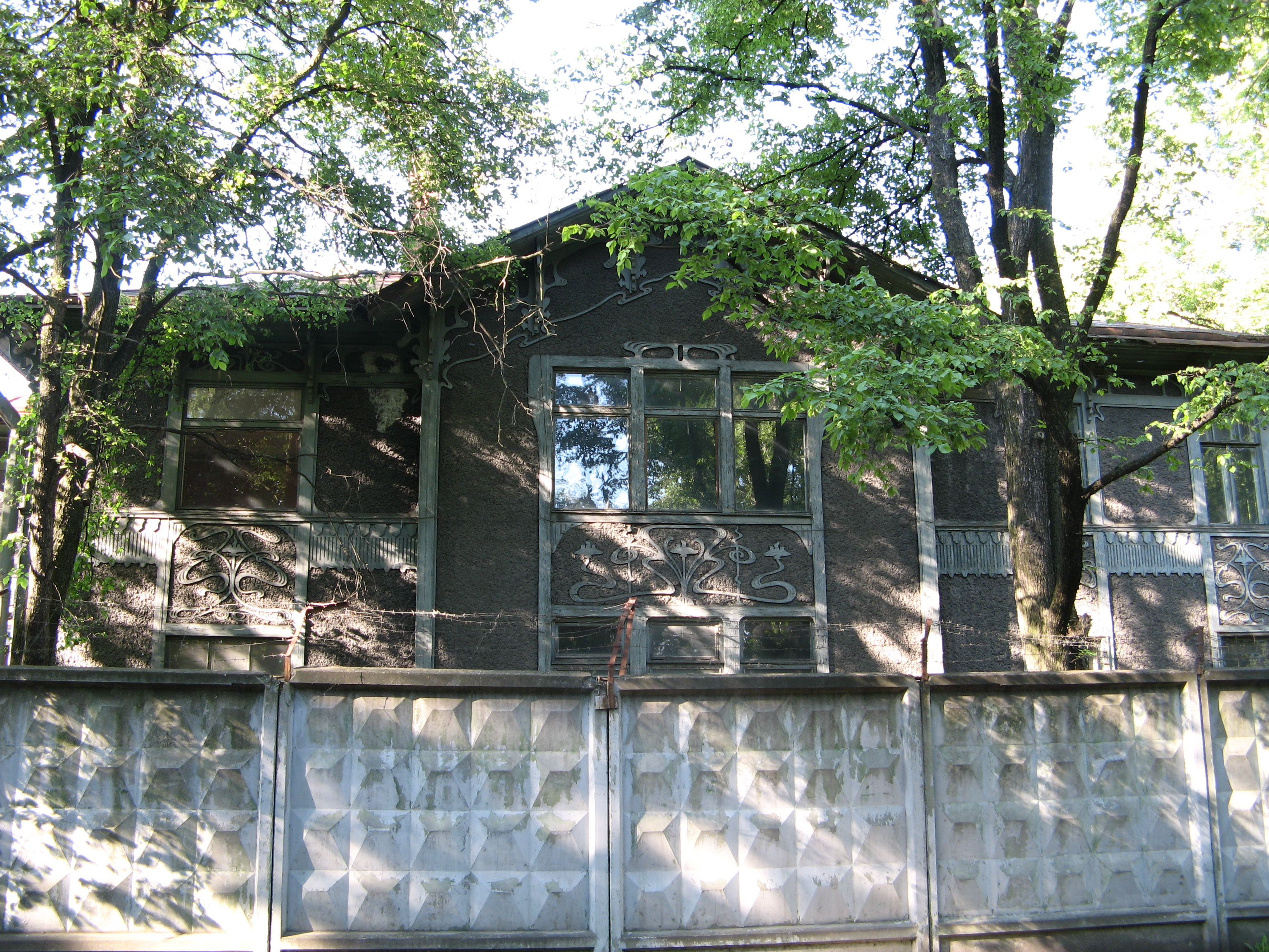 Особняк Экваля (Красногвардейский пер., 15, Санкт-Петербург)